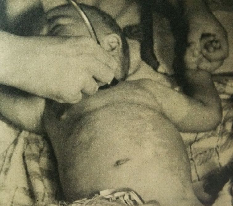 森永ヒ素ミルク事件被害児